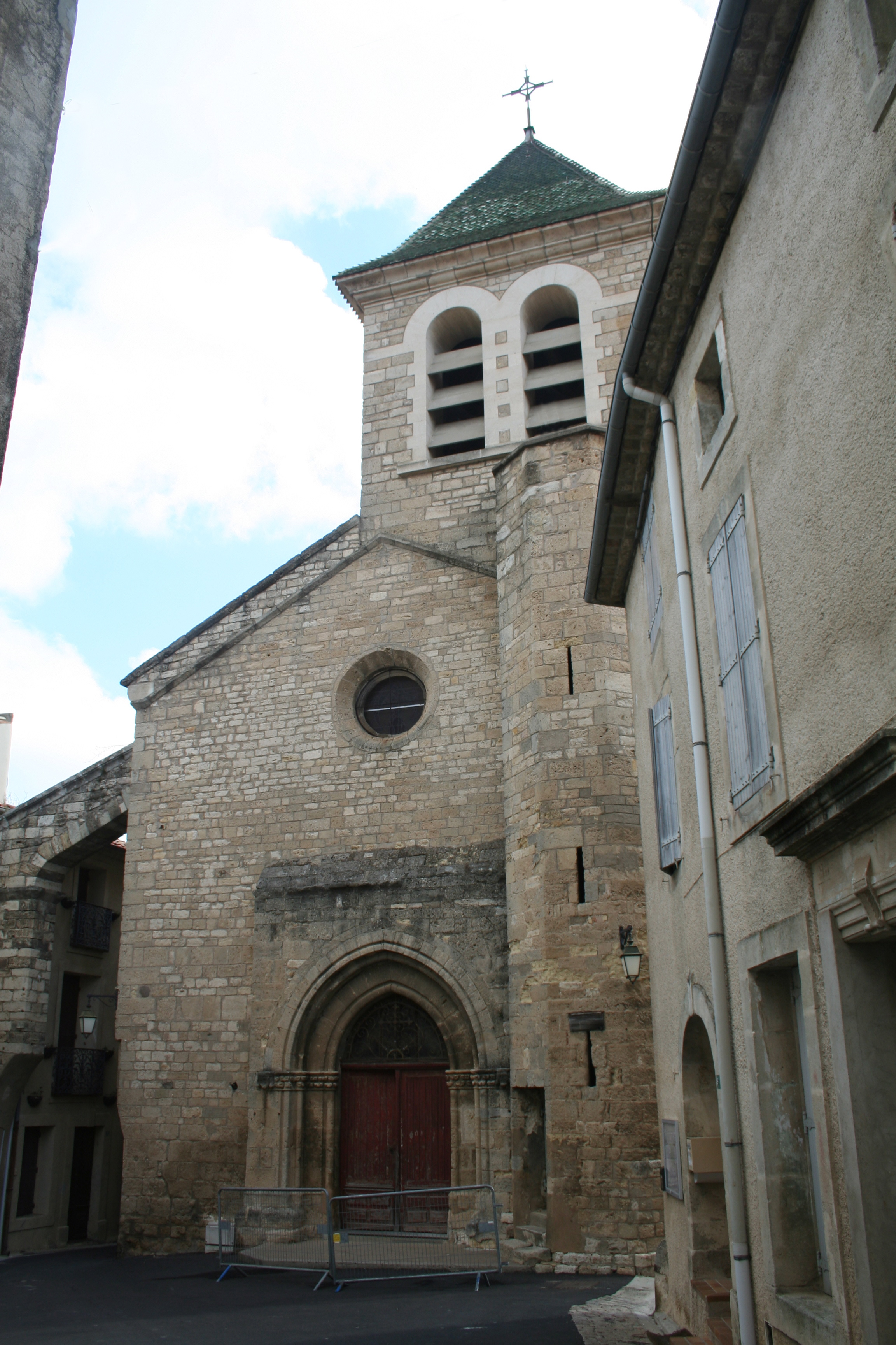 Saint-Geniès-de-Fontedit (Hérault) - façade de l'église Saint-Geniès.